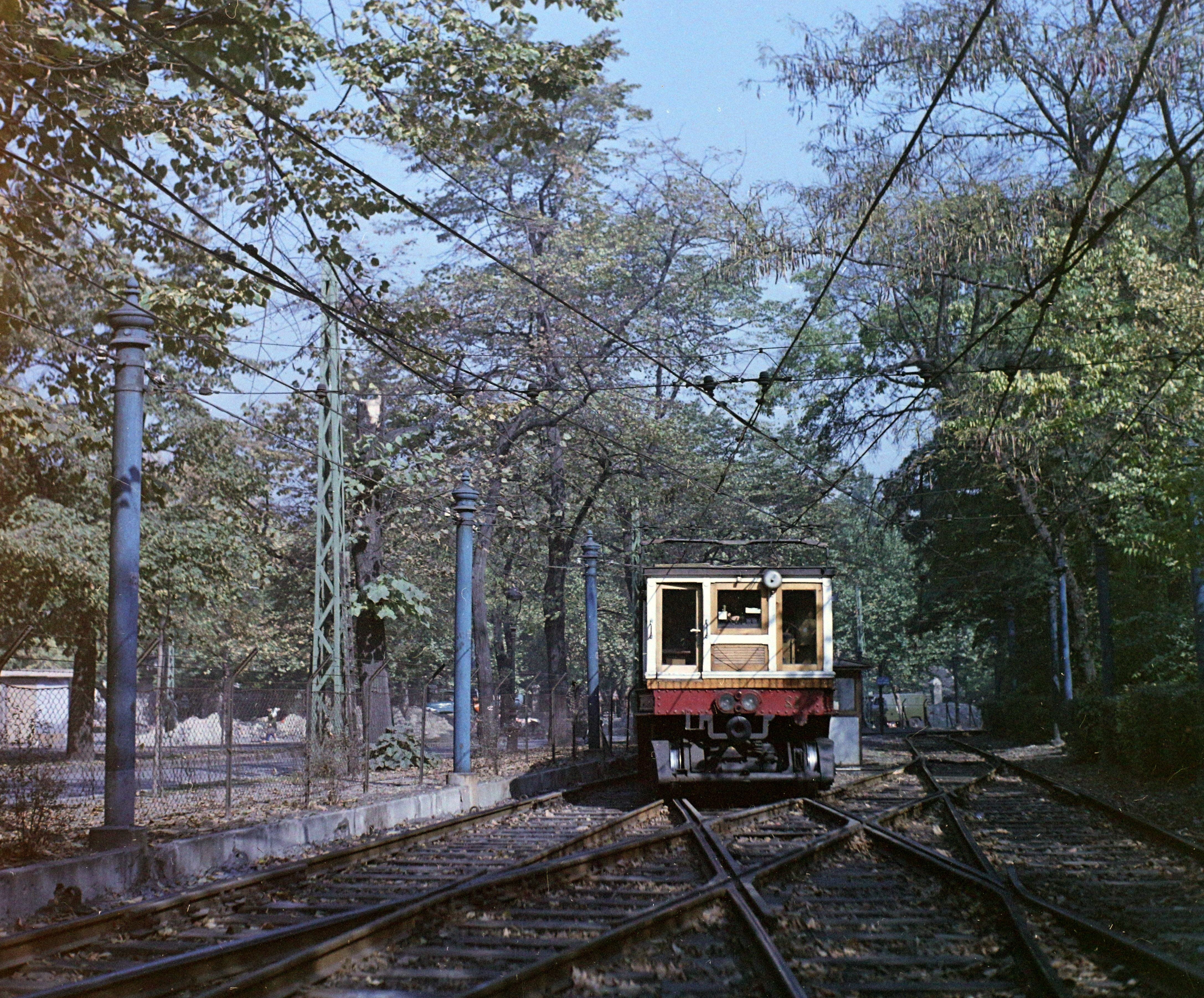 a Millenniumi Földalatti Vasút mára megszünt felszíni szakasza a Hősök tere és a Széchenyi fürdő között. Location: Hungary, Budapest XIV. Tags: colorful, underground railway, Budapest Title: a Millenniumi Földalatti Vasút mára megszünt felszíni szakasza a Hősök tere és a Széchenyi fürdő között.